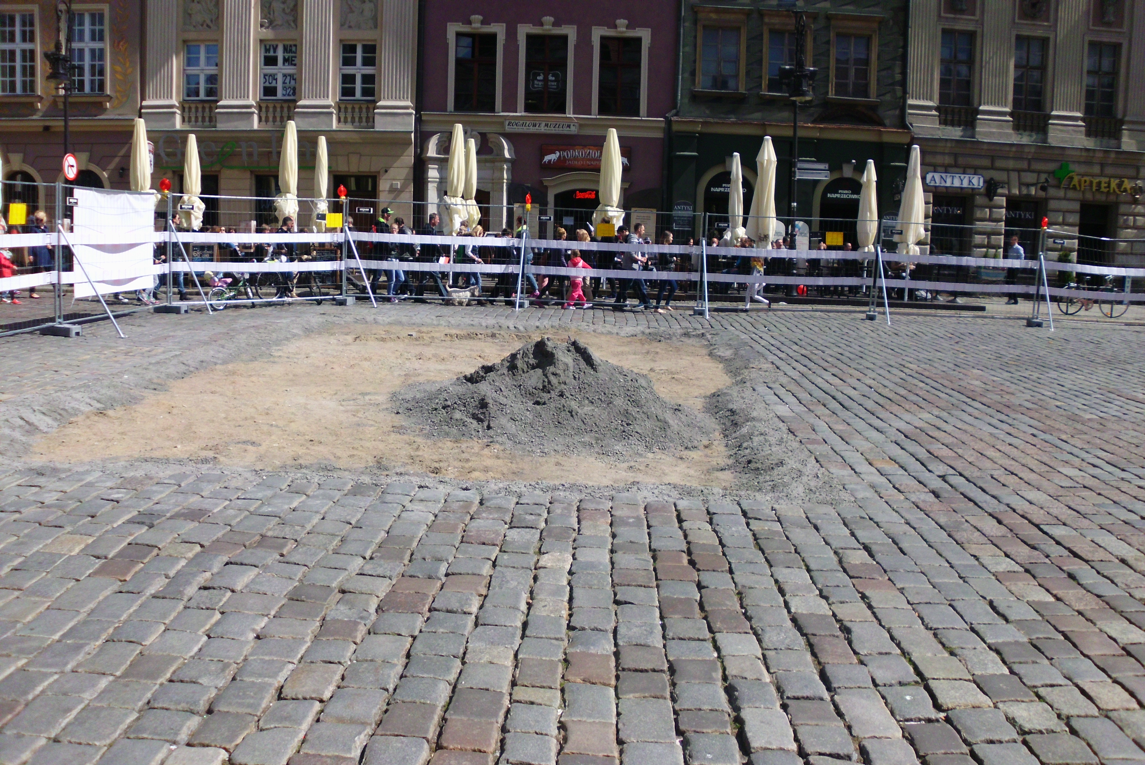 Wykopaliska archeologiczne na płycie Starego Rynku w Poznaniu - maj 2015